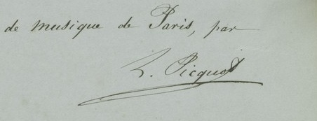 Détail de la signature de Louis Picquot sur la page de garde de la collection des 20 quintettes de Boccherini.